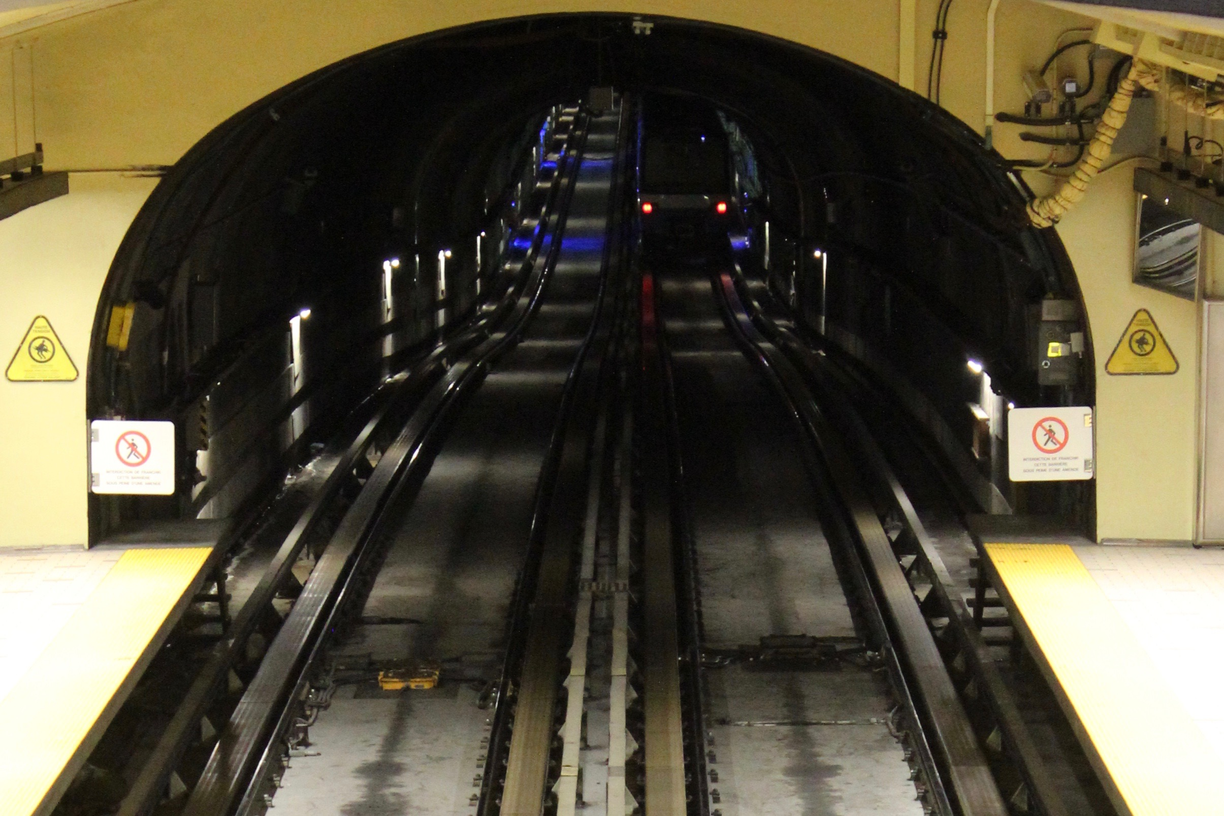 Pente station Beaudry direction Papineau